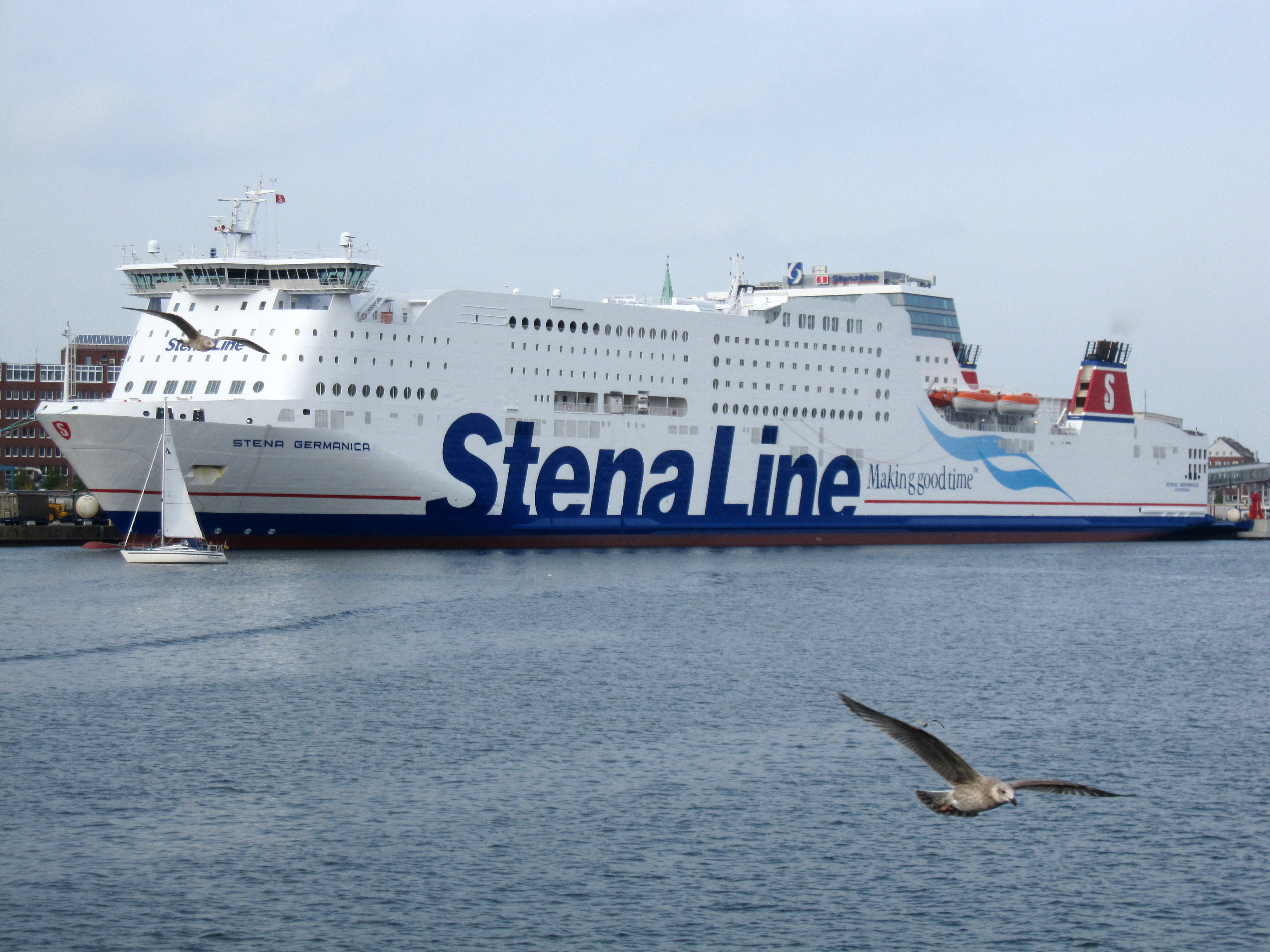 Stena Germanica III im Kieler Hafen. IMO Number: 9145176 MMSI Number: 266331000 Callsign: SLDW Length: 240 m Beam: 29 m